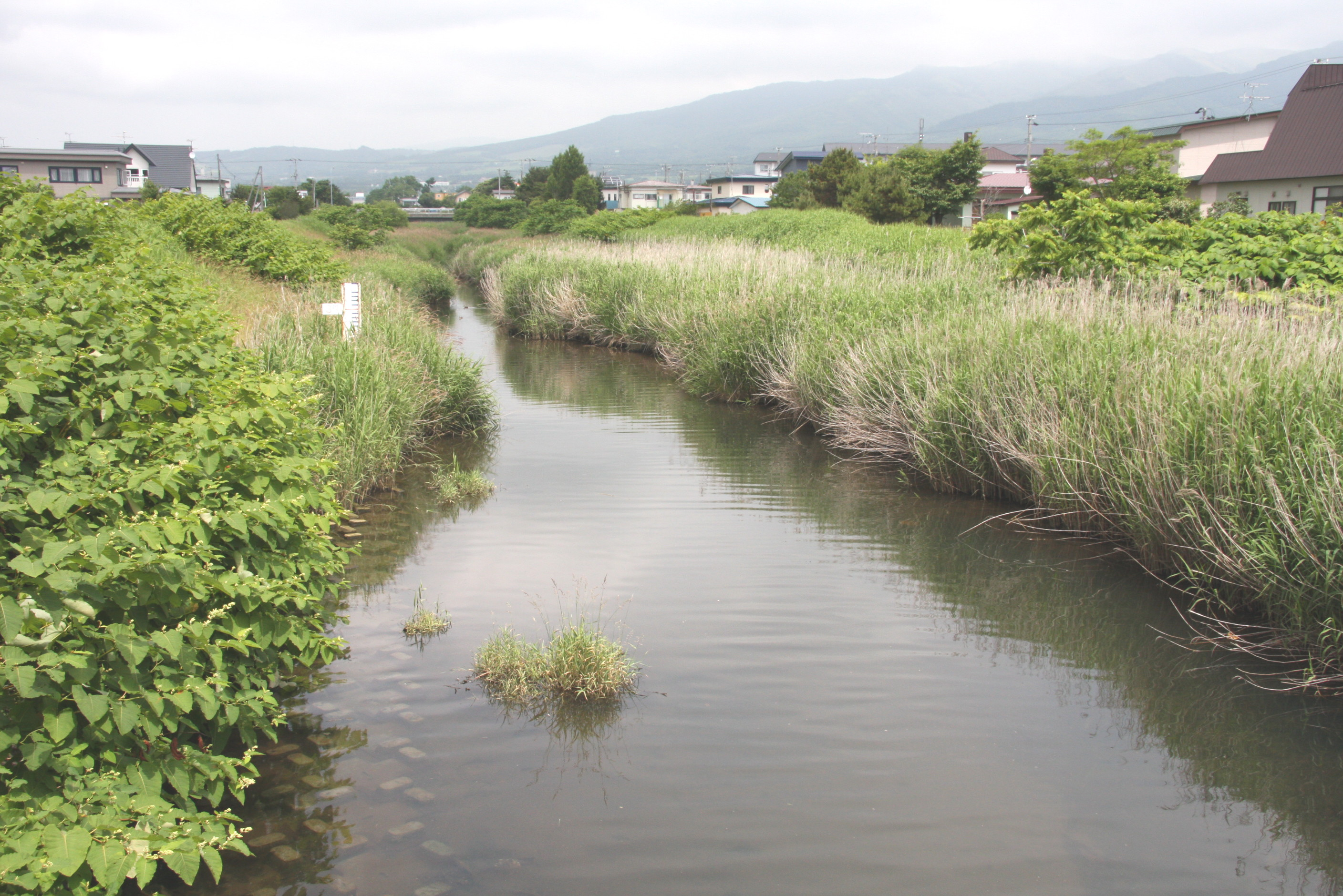 シャミチセ川 旭橋より上流を望む